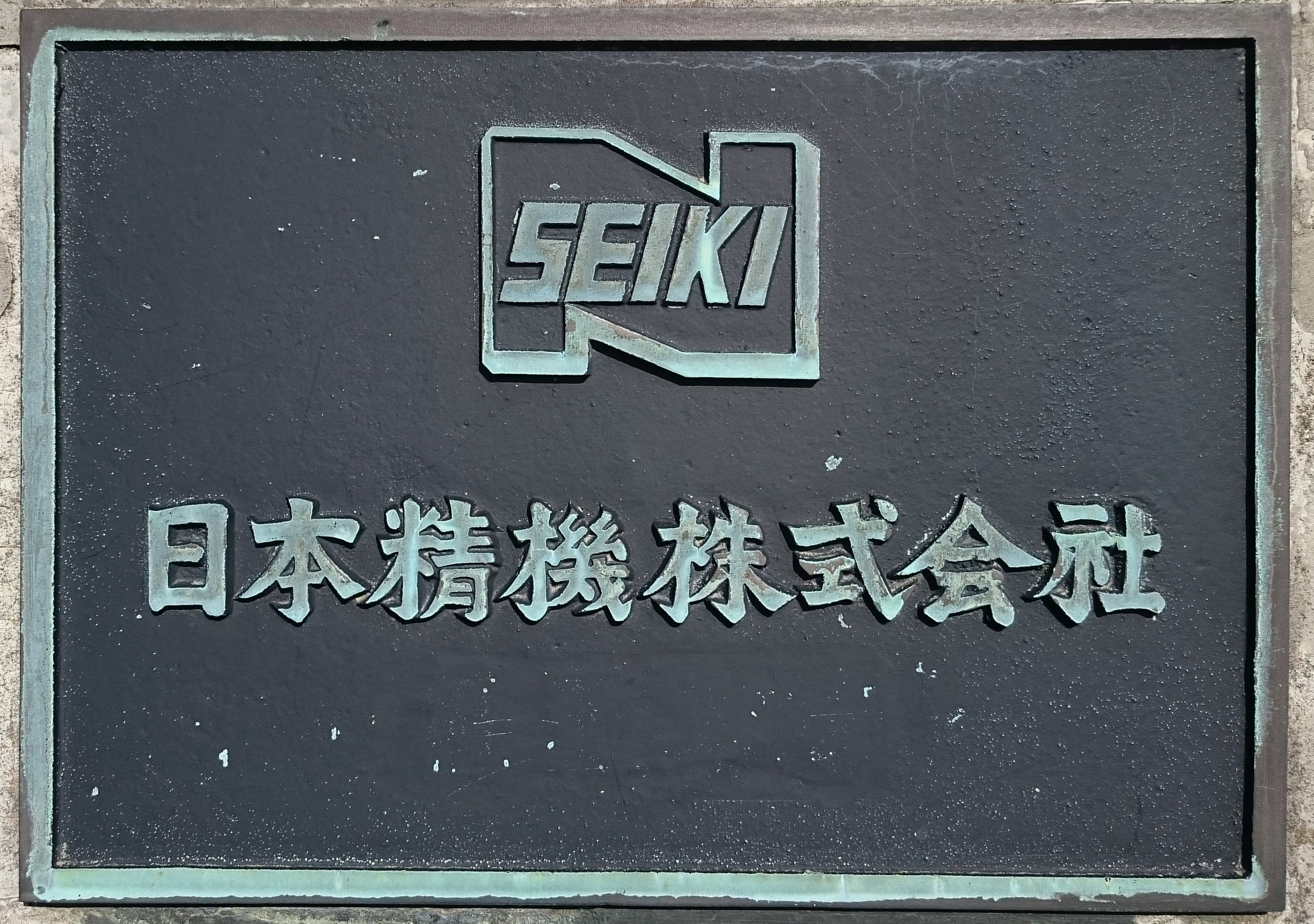 日本精機の会社表示